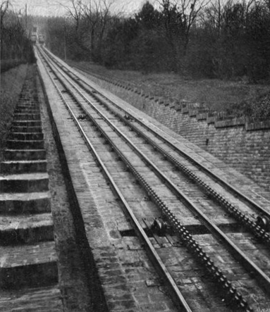 Lanová dráha na Petřín začátkem 20. století